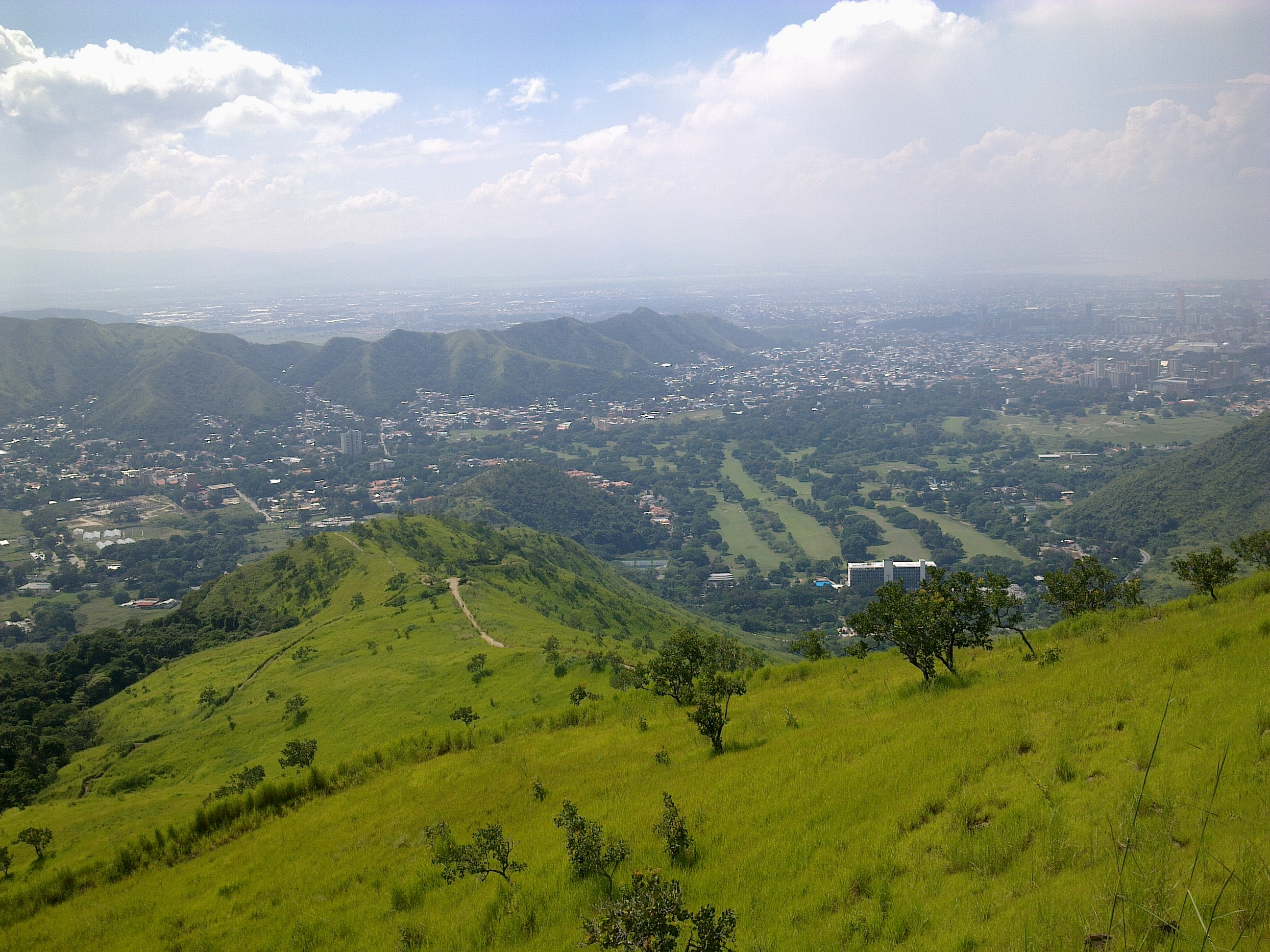 VISTA DESDE EL CERRO DEL HOTEL MARACAY